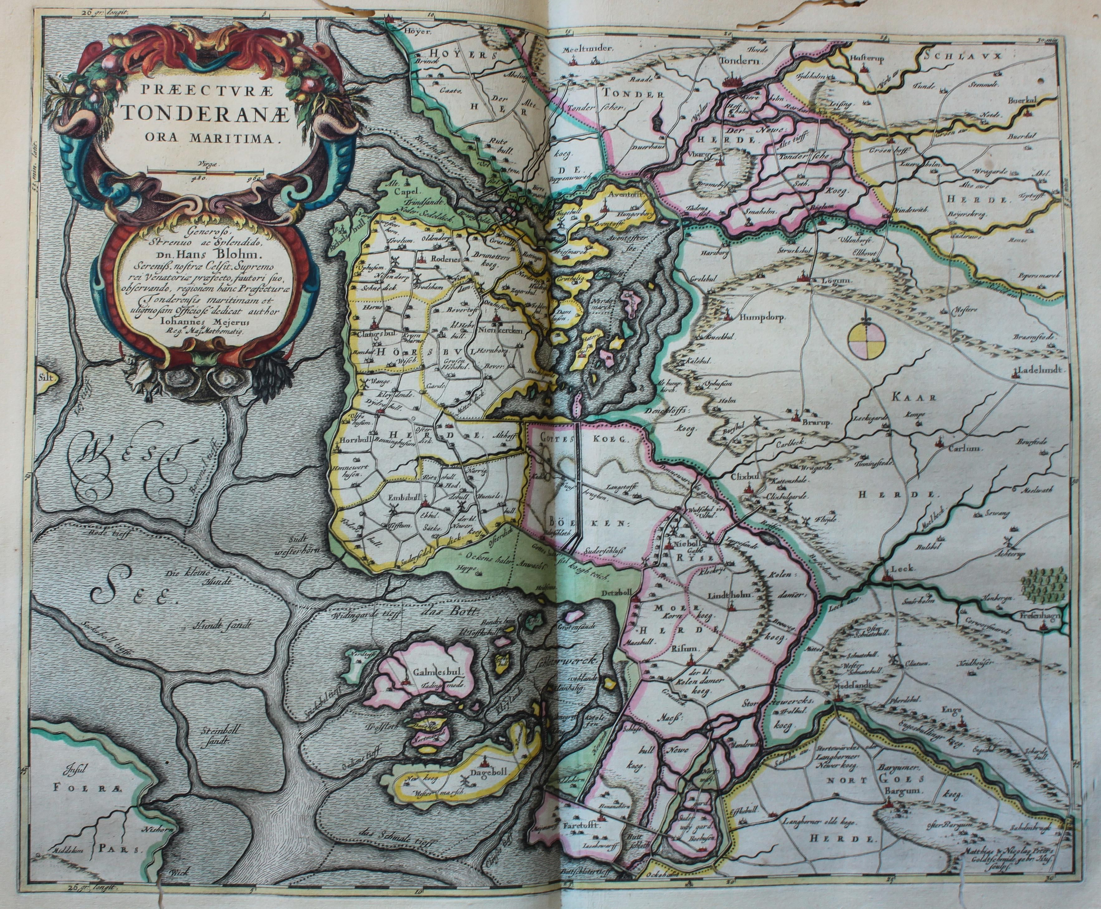 Descripción bibliográfica: Geographia Blaviana. - [Amsterdam : Juan Blaeu, 1659] . - [32], VI, 96 p., 34 f., h. 35a, 35b, 35c, 35d, 36-44 f., 34, [2], 36-40, [2], 43-70 [i. e. 75], [1] f., [20] p. de map., [9] f. de map., [4] f. pleg. de map., [2] f. de plan., [2] f. ge grab. : |bil. ; |cFol. marca major (57 cm.) . - En la dedicatoria a Felipe IV: "Presenta ... El Atlas Universal y Cosmographico de los orbes y terrestre ... Juan Blaeu" . - Título tomado del frontispicio. -- Privilegio fechado en 1659. -Errores de pag. - Sign.: 1, *2, **3, ***-****2, a-e2, A-I2, K1, L-Z2, Aa-Dd2, 4 2, Ee-Ff2, A-I2, K1, L2, M1, N-Y2, Z5, Aa-Dd2, Ee1, A-D2, E-F1, G-I2, K-L1, M-O2, P1, Q-Z2, Aa-Bb2, Cc1, Dd3, Ff-Zz2, Aaa-Bbb2, . - Frontispicio grab. col. -- Incluye un total de 49 il. entre map., plan. i grab. Materia: Atlas - Obras anteriores a 1800 Impresor: Blaeu, Joan, 1596-1673, imp. Lugar de impresión: Holanda. Amsterdam Localización: Vea la ilustración en su contexto Visite también la exposición "Cartografía histórica en la Biblioteca de la Universidad de Sevilla"